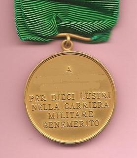 Italian military medal "medaglia Mauriziana"